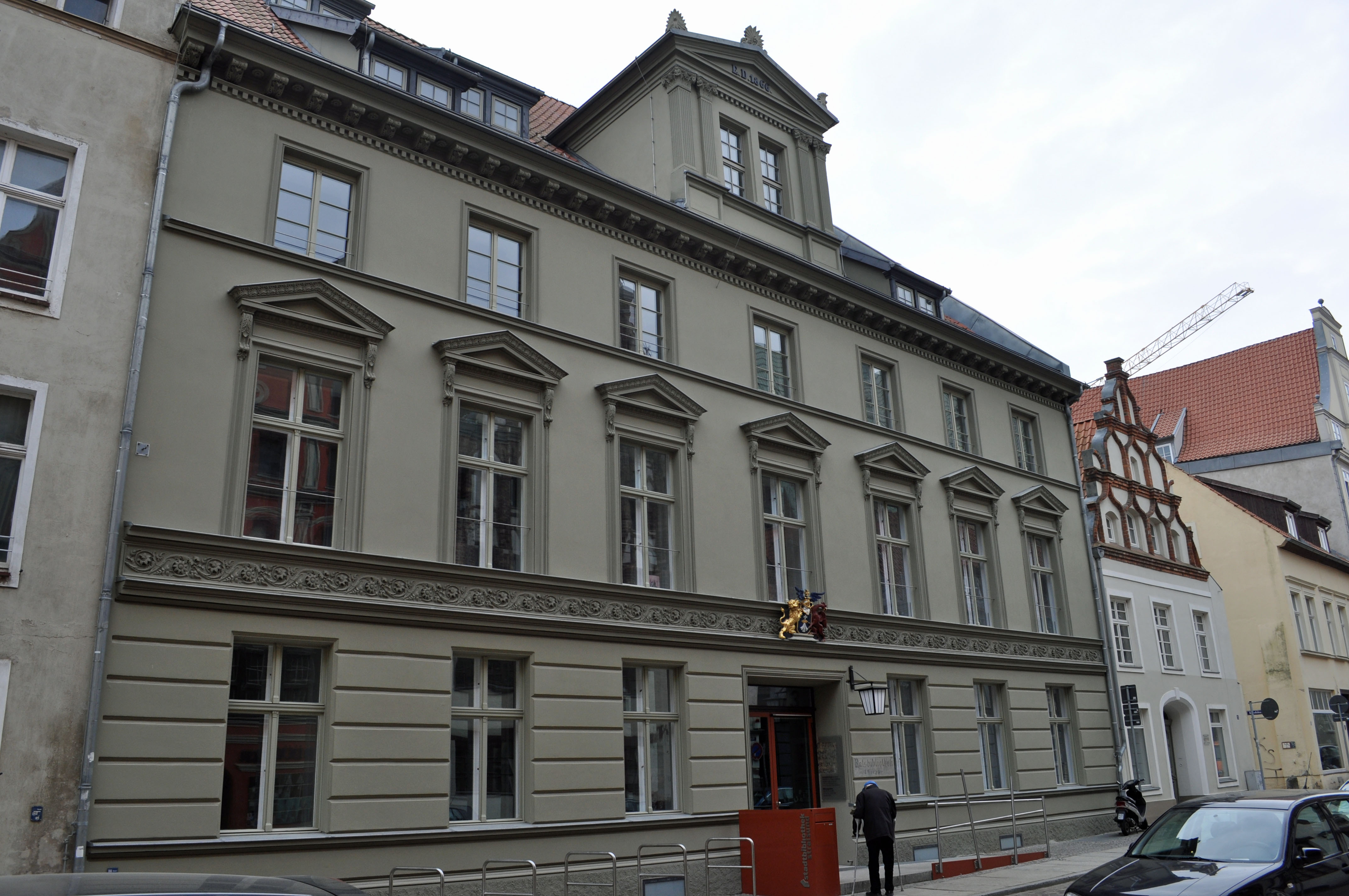 Gebäude bzw. Gebäudedetail in Stralsund. Straße und Hausnummer siehe Dateiname.